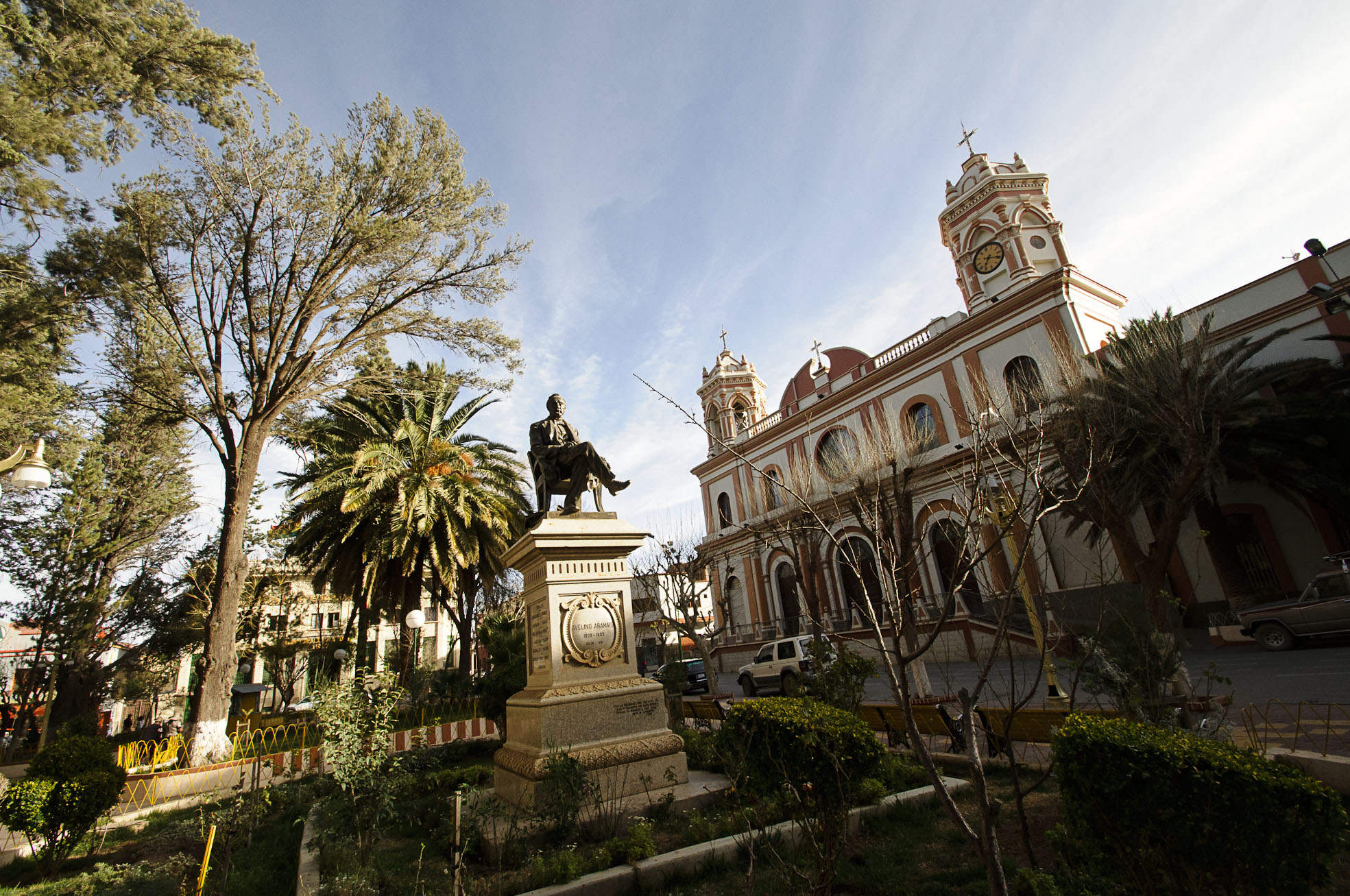 Plaza principal de Tupiza. La estatua rinde homenaje a la familia Aramayo. Esta foto se tomó el 24 de agosto, 2011 en Sud Chichas, Potosí, Bolivia, con una Nikon D90.